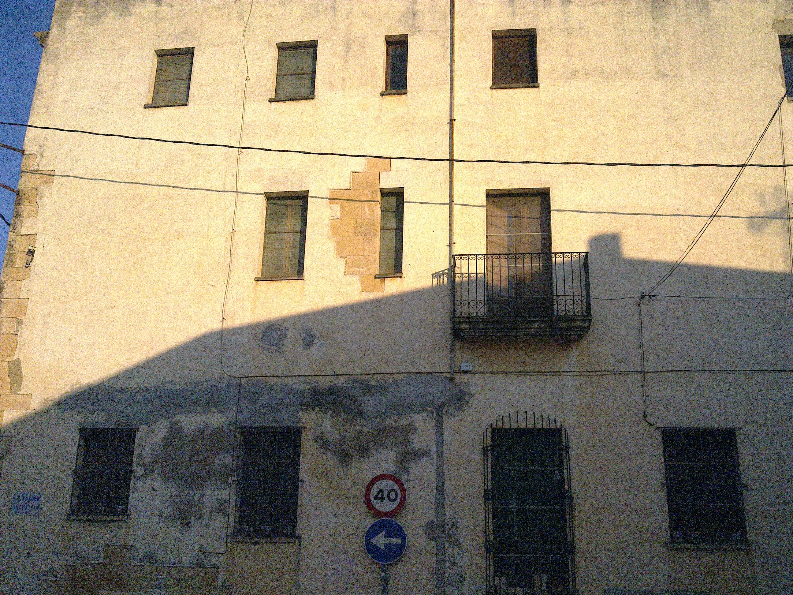 Castell de Clarà (Torredembarra)